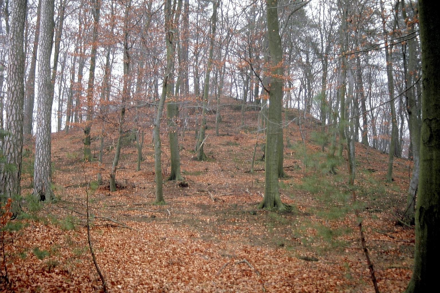 "Anselburg" bei Neuhemsbach